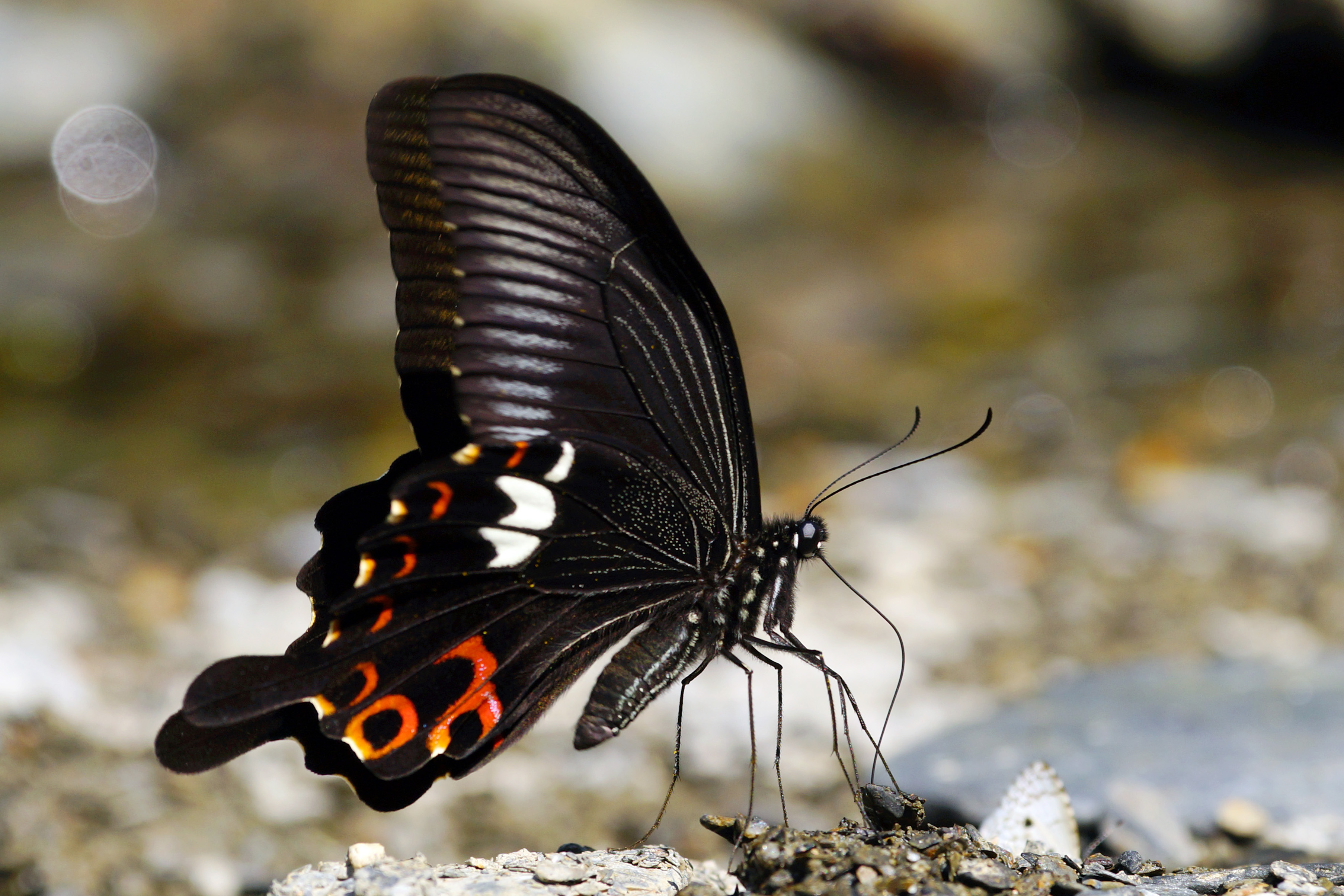 白紋鳳蝶 Papilio helenus fortunius